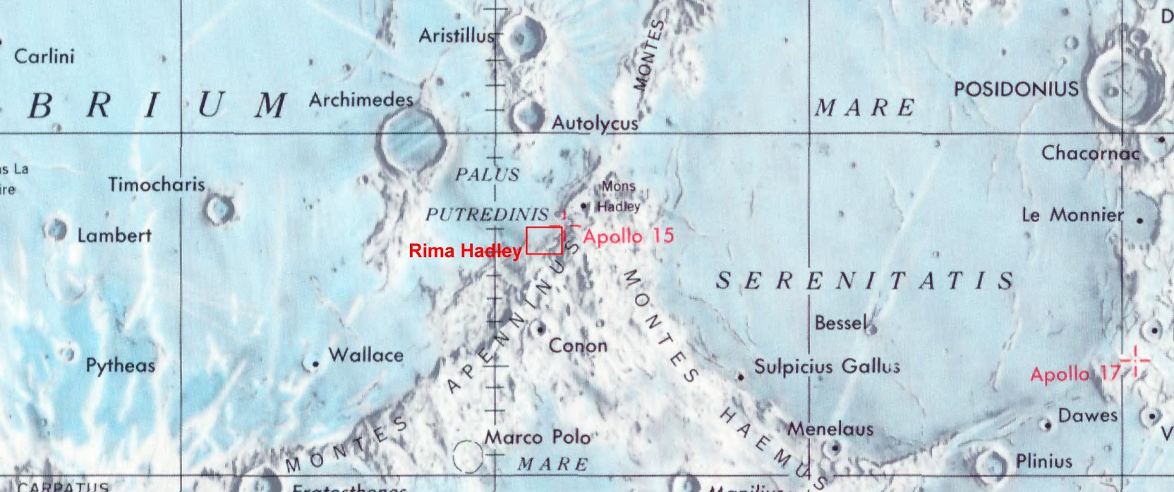 Rima Hadley. Localización. (Lunar Chart LPC1. Second Edition)